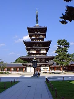 薬師寺東塔（撮影1998年8月、撮影者sutou。）